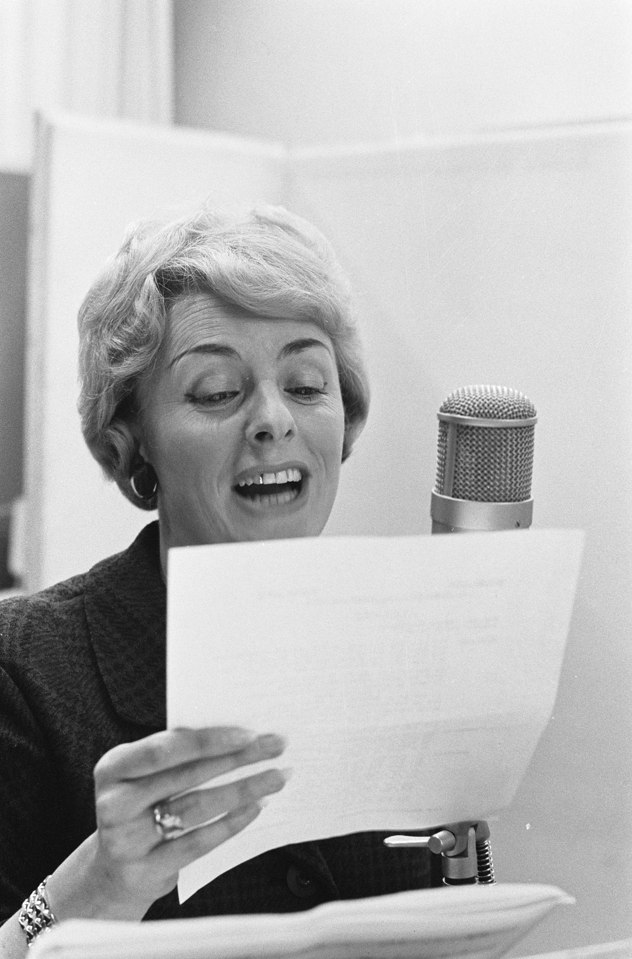 Collectie / Archief : Fotocollectie Anefo Reportage / Serie : [ onbekend ] Beschrijving : Annie Palmen heeft in de Phonogramstudio te Hilversum het uitgekozen Eurovisie Songfestivalliedje opgenomen Datum : 5 februari 1963 Locatie : Hilversum Trefwoorden : artiesten, muziekstudios, opnamen, songfestivals Persoonsnaam : Palmen, Annie Fotograaf : Gelderen, Hugo van / Anefo Auteursrechthebbende : Nationaal Archief Materiaalsoort : Negatief (zwart/wit) Nummer archiefinventaris : bekijk toegang 2.24.01.05 Bestanddeelnummer : 914-7877